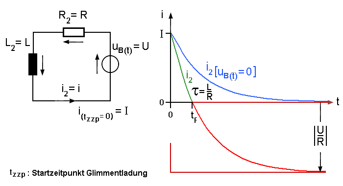 Ersatzschaltbild und Verlauf einer Glimmentladung im Ausgangskreis einer Zündspule